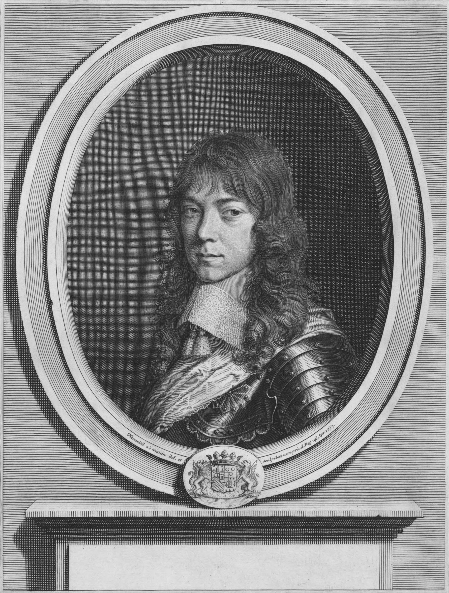 Porträt des Godefroy Maurice de La Tour d'Auvergne, Herzog von Bouillon